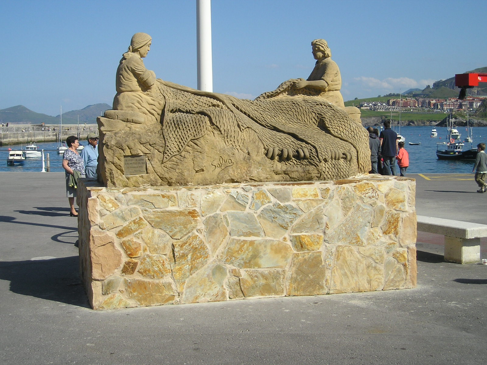 Monumento en el paseo marítimo de Castro Urdiales, en Cantabria (España).